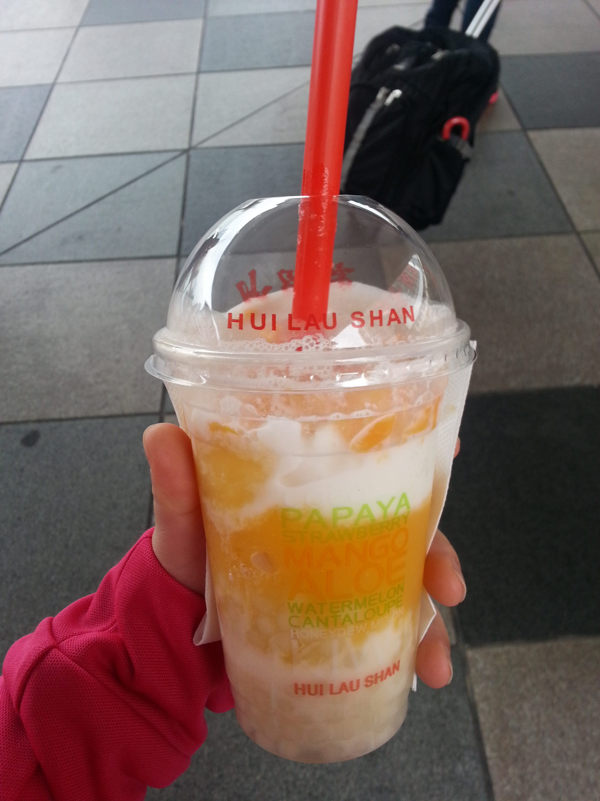 허유산의 음료이다